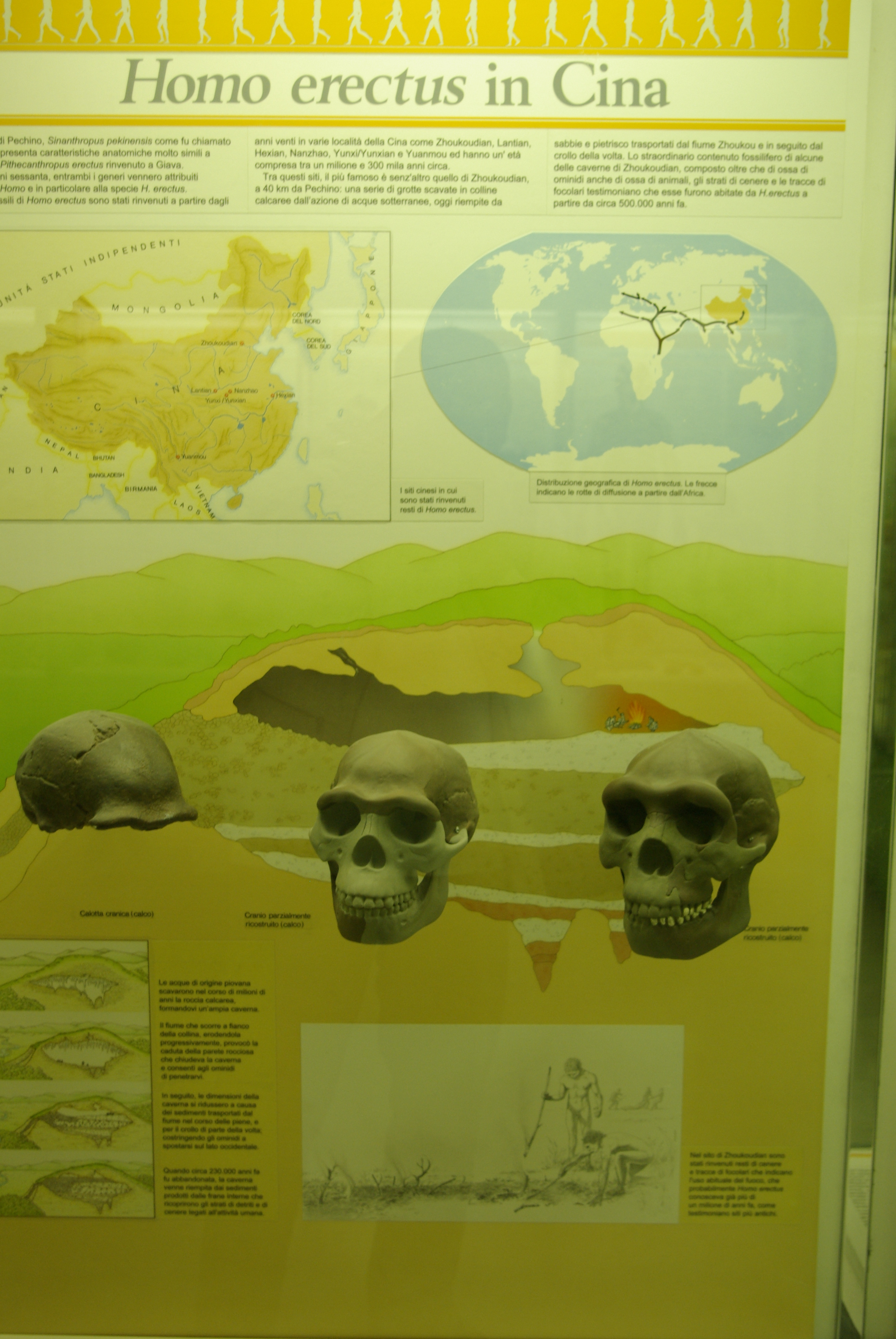 Museo civico di storia naturale This is a photo of a monument which is part of cultural heritage of Italy.